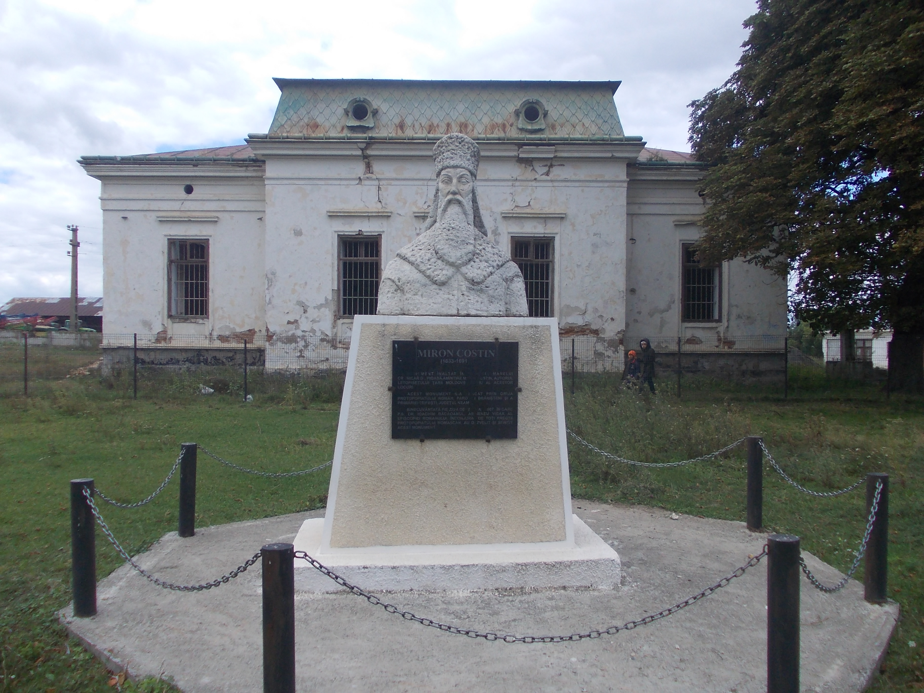 Bustul cronicarului Miron Costin, lucrare realizată de Clement Pompiliu, şi care a stat în fostul Parc Miron Costin din Roman, locul în care a fost decapitat cronicarul. Azi, după modernizarea zonei a fost dusă în satul nemţean Miron Costin